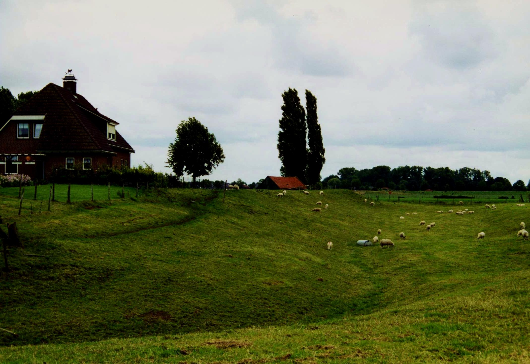 De grachtrestanten van huis Middelaar.